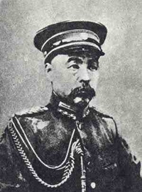 馮國璋，來源自此。